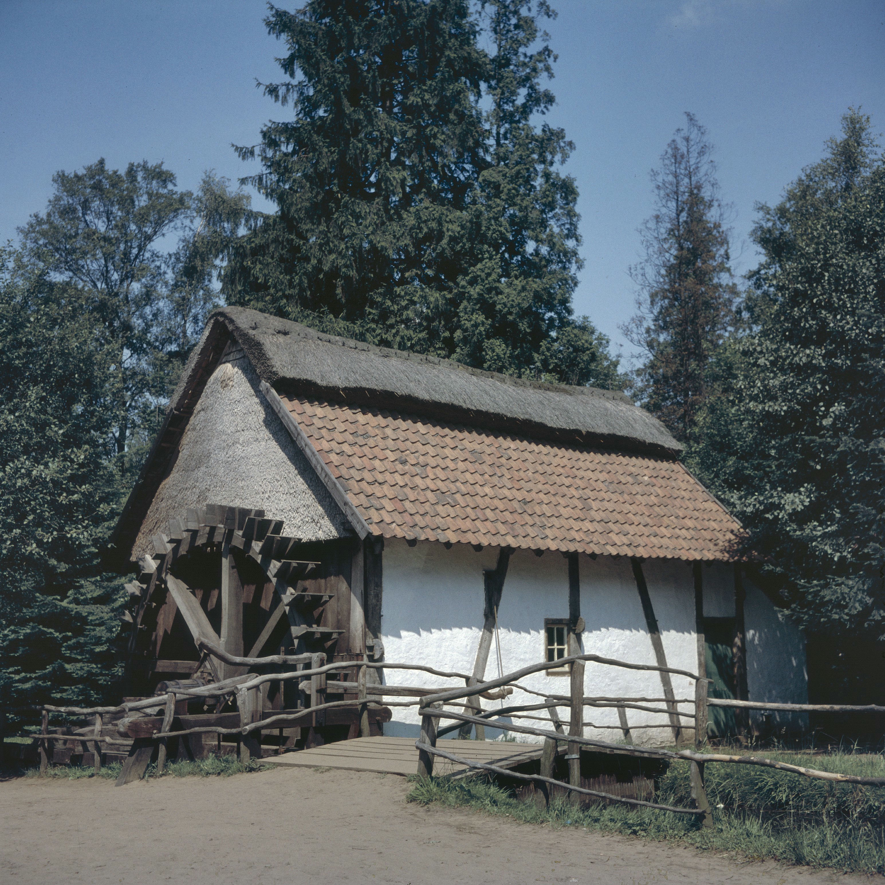 Slagmolen Van Ellikom: Overzicht, molen is sinds 1963 in het Openluchtmuseum te Bokrijk, Genk, te zien, afkomsig uit het dorpje Ellikom, Noord-Limburg (opmerking: Diacollectie Molens)